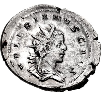 Antoniniano de Valeriano II, césar de Galiano e Valeriano I